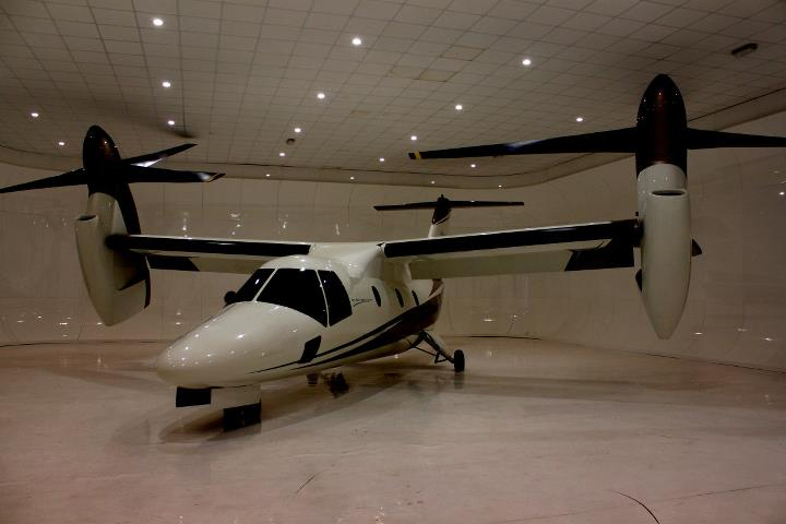 Convertiplano AgustaWestland AW609 presso il museo del volo di Volandia.